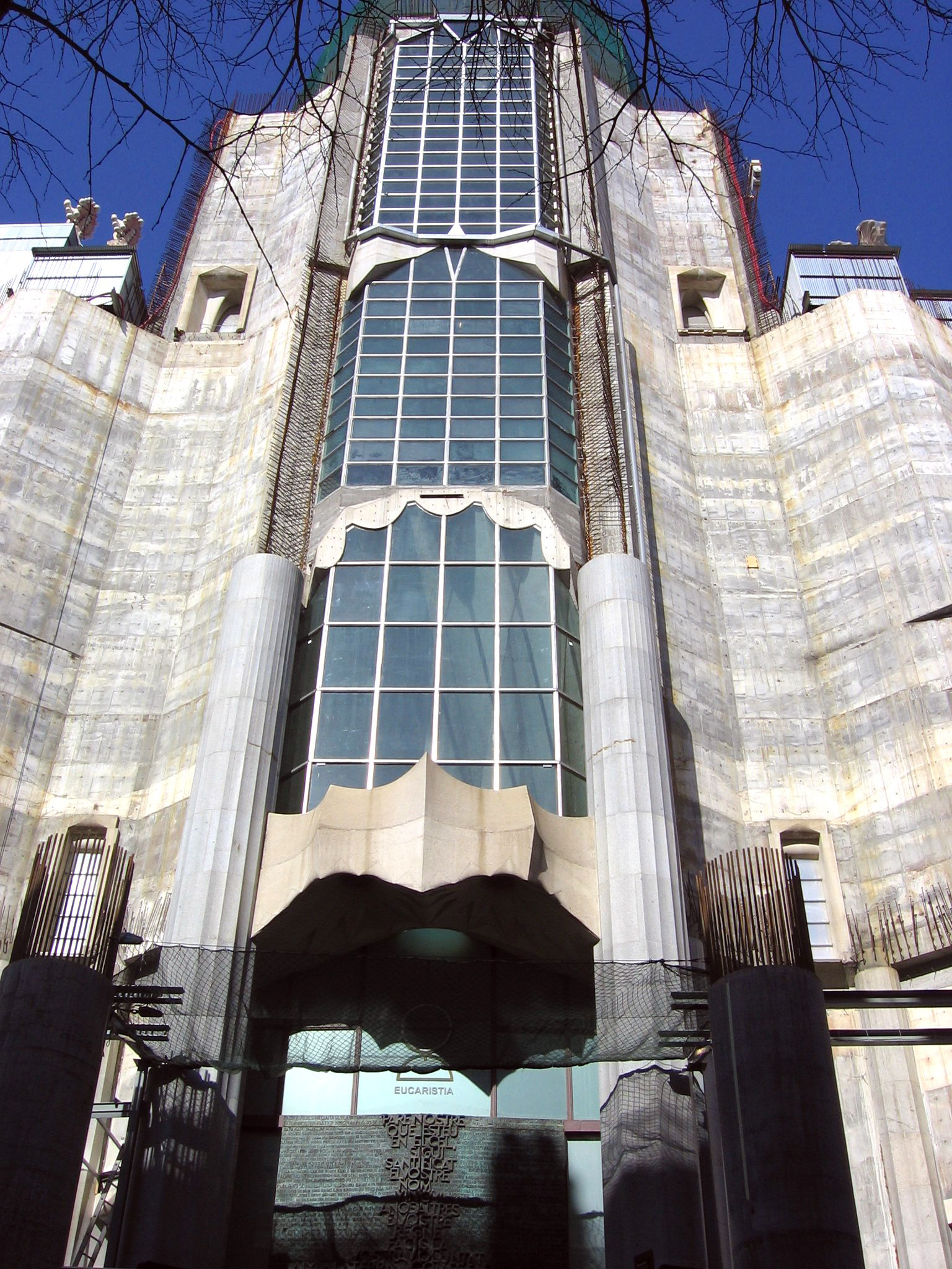 Fachada de la Gloria (febrero de 2012).